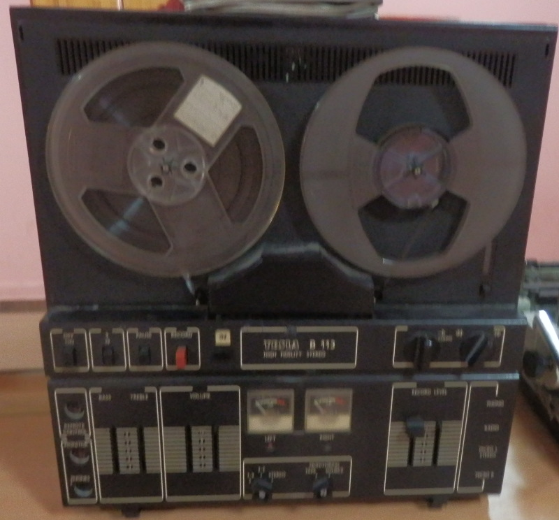 Magnetofon Tesla B113 bez krytu